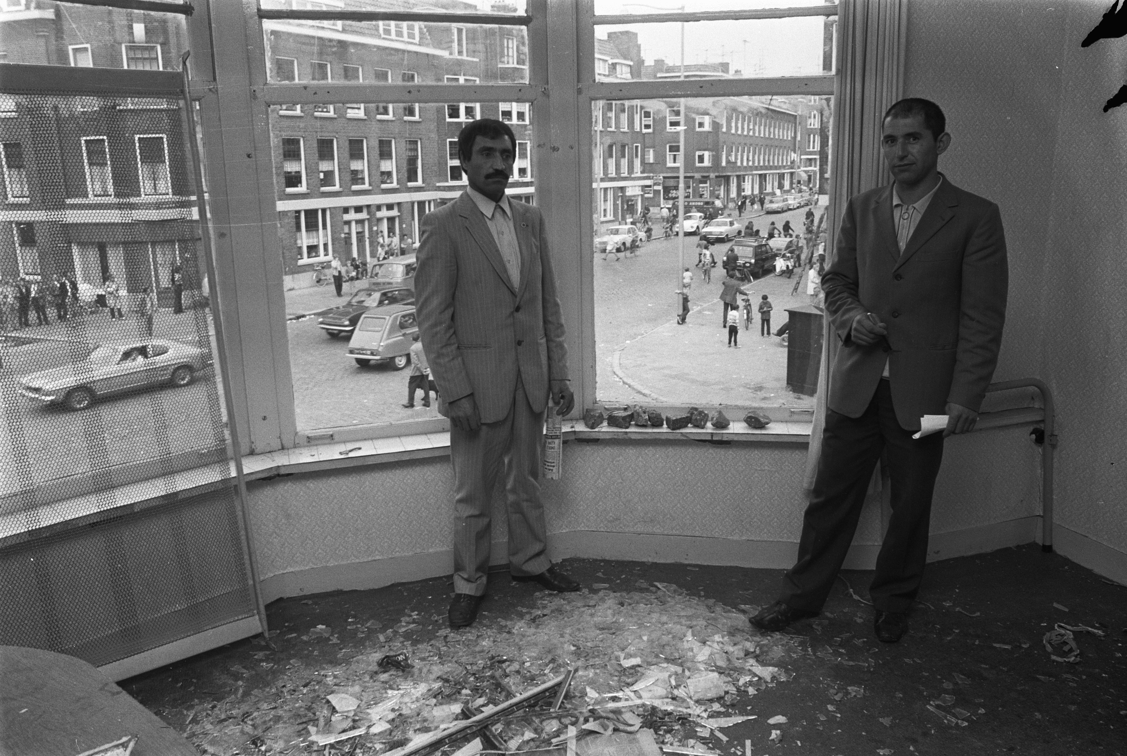 Collectie / Archief : Fotocollectie Anefo Reportage / Serie : [ onbekend ] Beschrijving : Turken in vernielde woningen na rellen in Afrikaanderbuurt te Rotterdam, twee Turken bij het raam in hun vernielde woning Datum : 15 augustus 1972 Locatie : Rotterdam, Zuid-Holland Trefwoorden : Turken, rellen, woningen Fotograaf : Verhoeff, Bert / Anefo Auteursrechthebbende : Nationaal Archief Materiaalsoort : Negatief (zwart/wit) Nummer archiefinventaris : bekijk toegang 2.24.01.05 Bestanddeelnummer : 925-8095